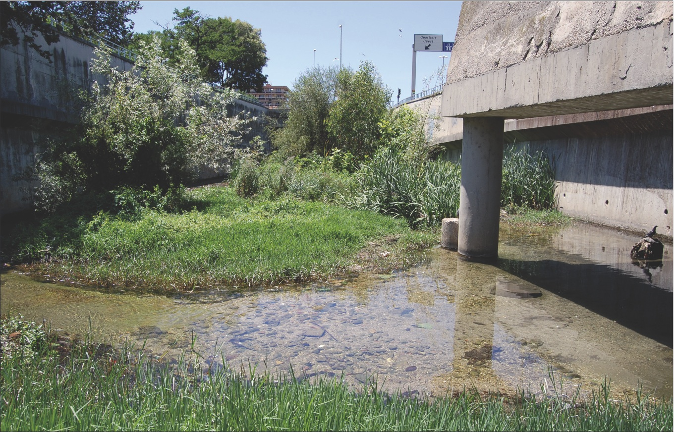 La Rivière Neuve est l'oeuvre de Vauban qui a détourné le Las à partir du quartier du Jonquet.